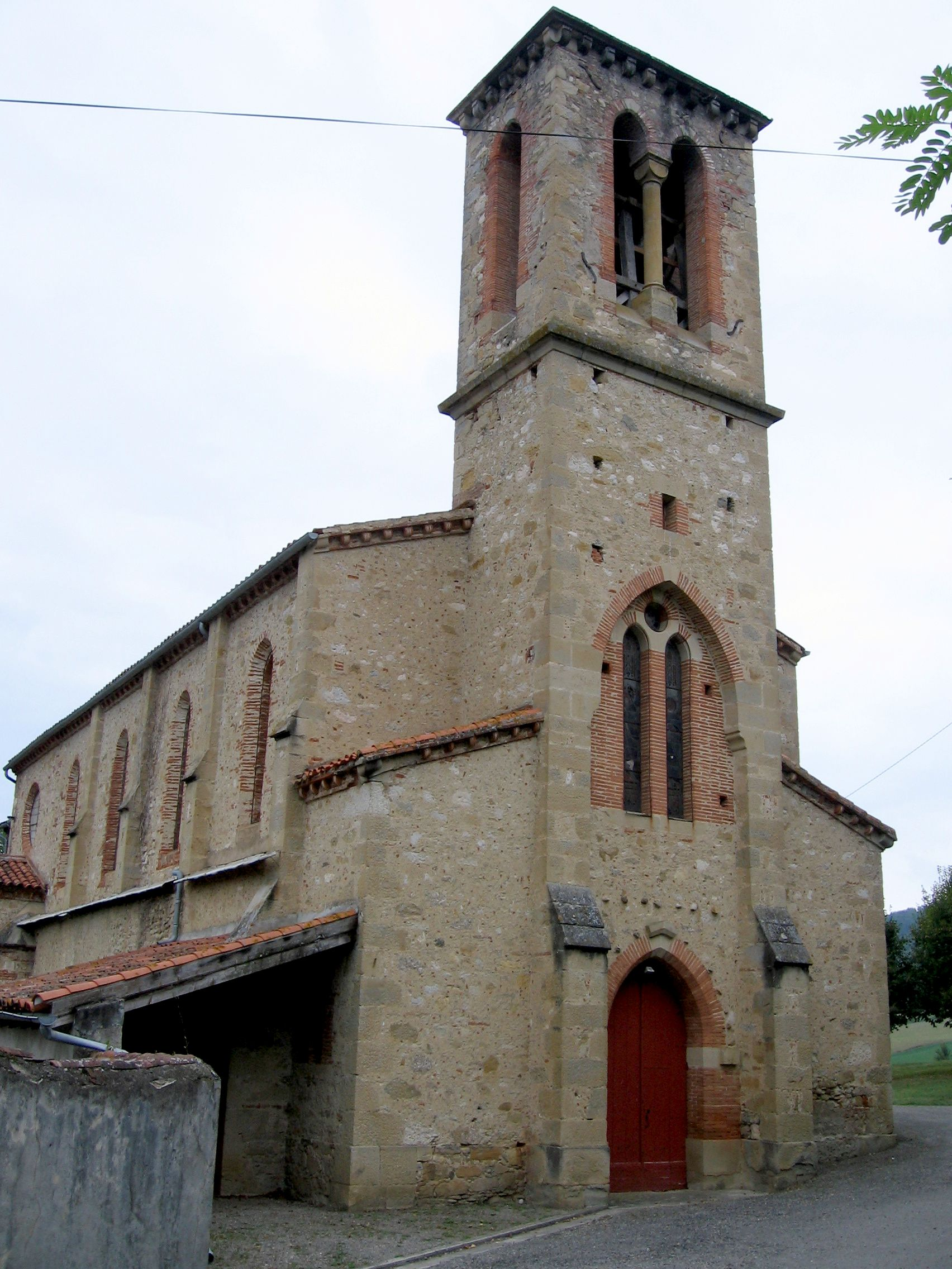 église de Montégut-Plantaurel.